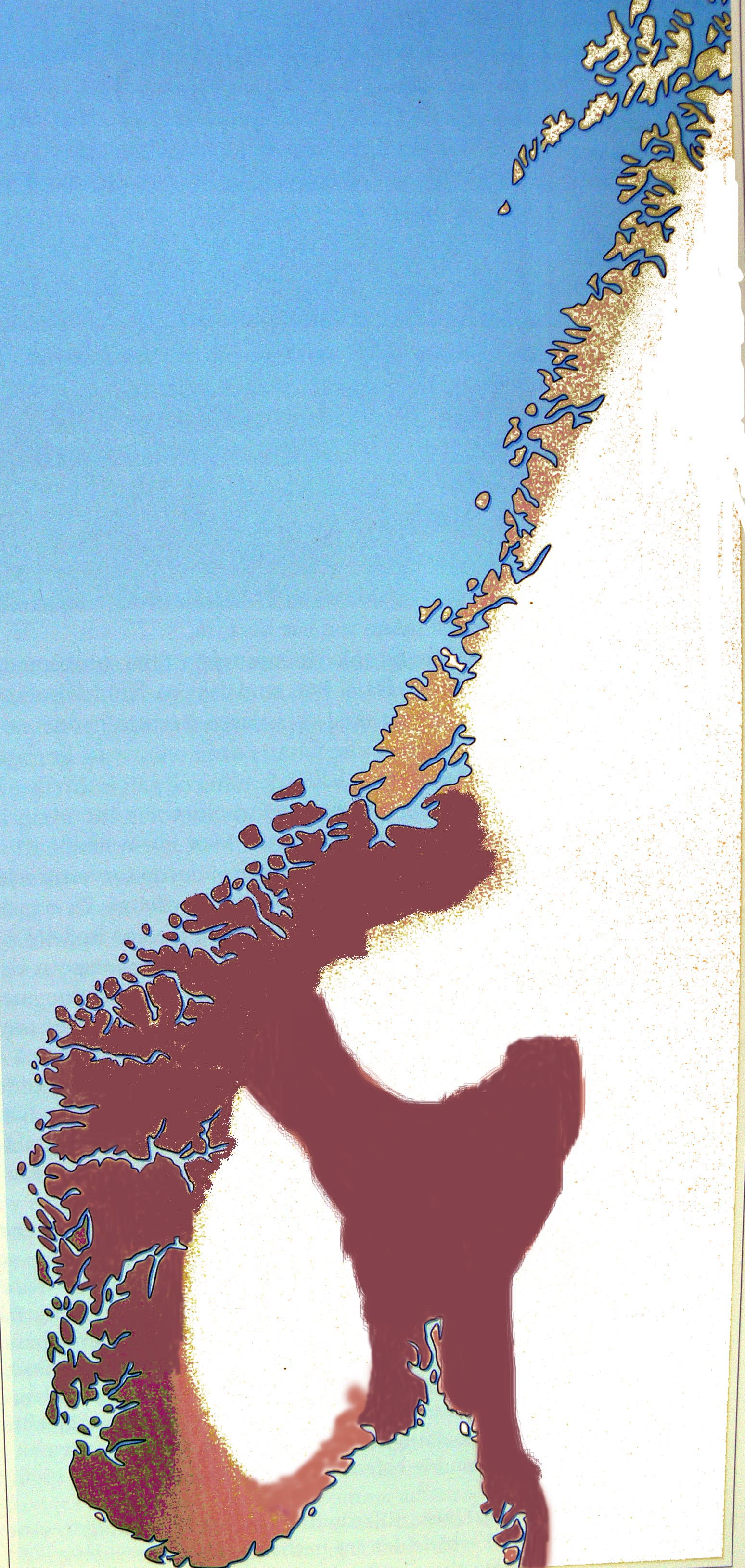 Das Einflussgebiet Harald Hårfagres nach der Schlacht am Hafrsfjord zwischen 870 und 900. Dunkelbraun: Sein unmittelbarer Herrschaftsbereich; Mittelbraun: Sein primäres Einflussgebiet. Beige: Sein sekundäres Einflussgebiet (Verbündete).